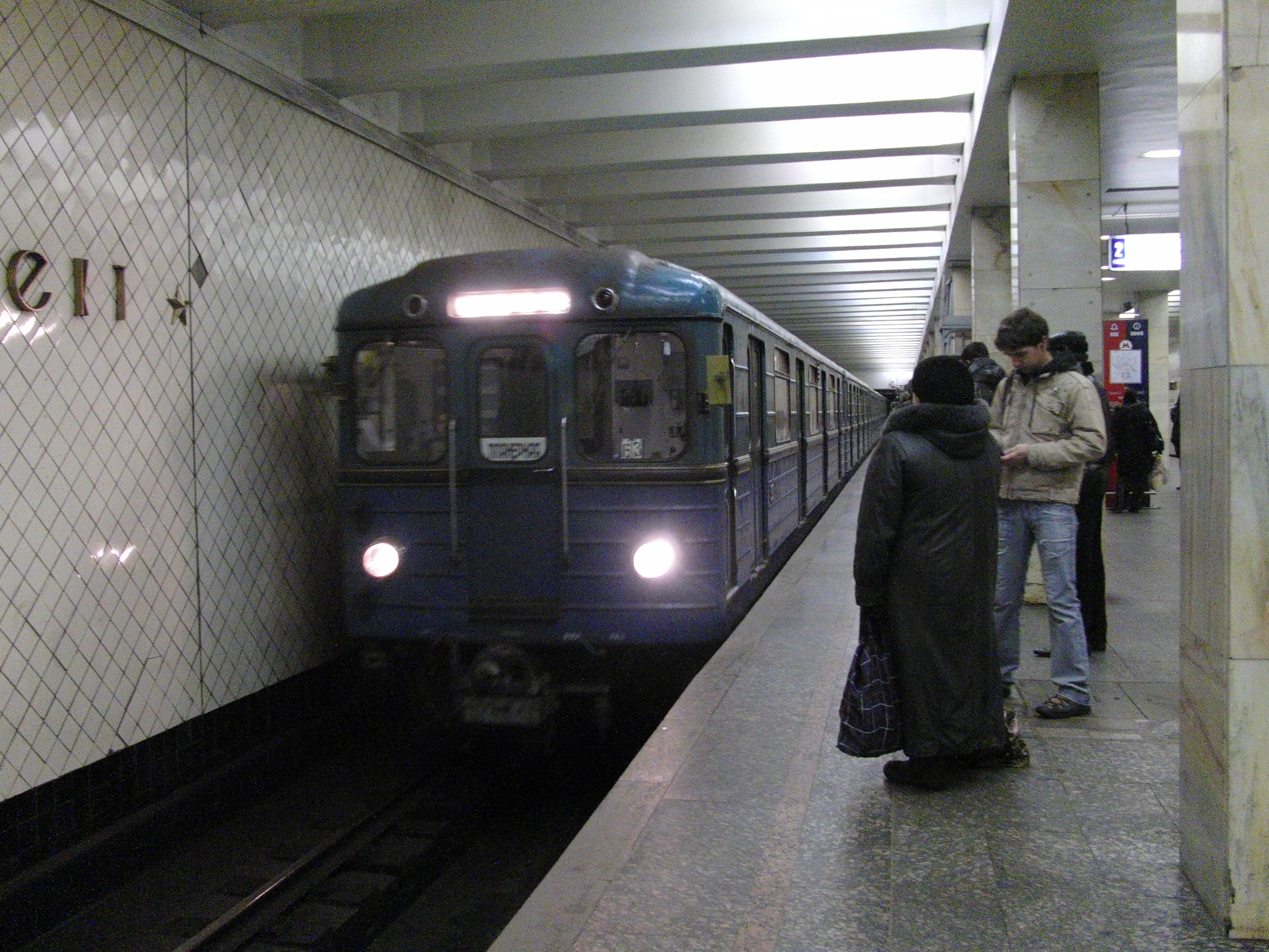 Volgogradsky Prospekt (Волгоградский проспект)